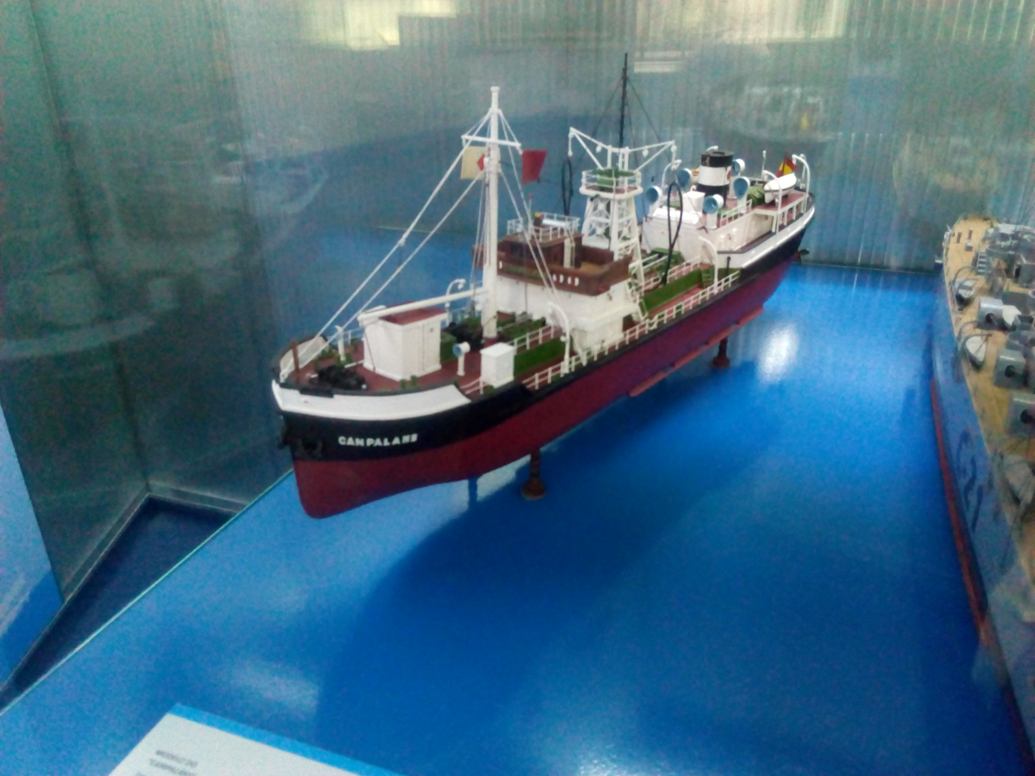 maqueta buque Campalans - Museo del Mar